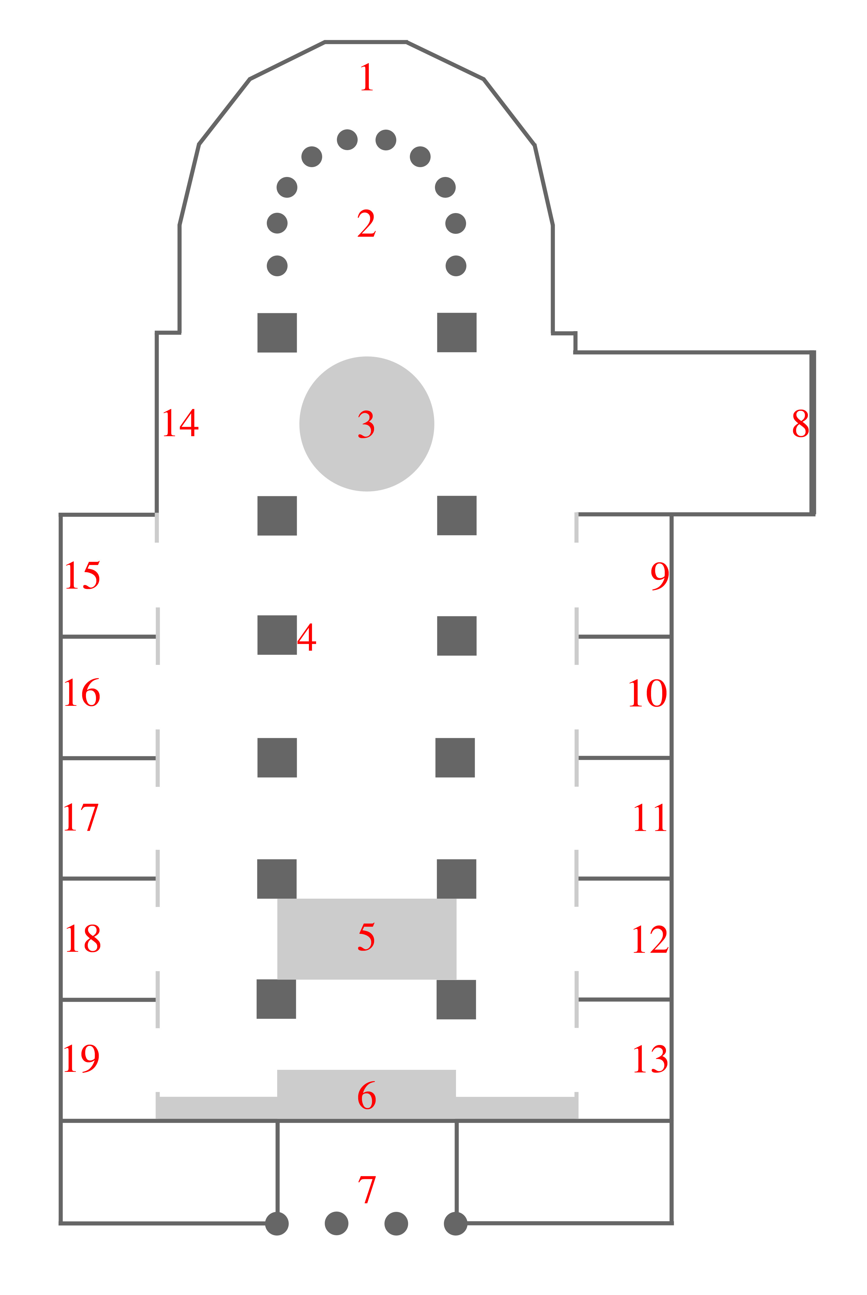 Vereinfachte Grundrissdarstellung der Kathedrale in La Laguna 1 Deambulatorio 2 Altar Mayor 3 Cúpula 4 Púlpito 5 Sillería del Cabildo Catedral 6 Tribuna del Órgano 7 Portal 8 Capilla de los Remedios 9 Capilla lateral del lado de la Epístola 10 Capilla lateral del lado de la Epístola 11 Entrada lateral calle Obispo Rey Redondo (Calle Carrera) 12 Capilla lateral del lado de la Epístola 13 Capilla lateral del lado de la Epístola 14 Cuadro de los Almas del Purgatorio 15 Capilla lateral del lado del Evangelio 16 Capilla lateral del lado del Evangelio 17 Entrada lateral calle Bencomo 18 Capilla lateral del lado del Evangelio 19 Baptisterio